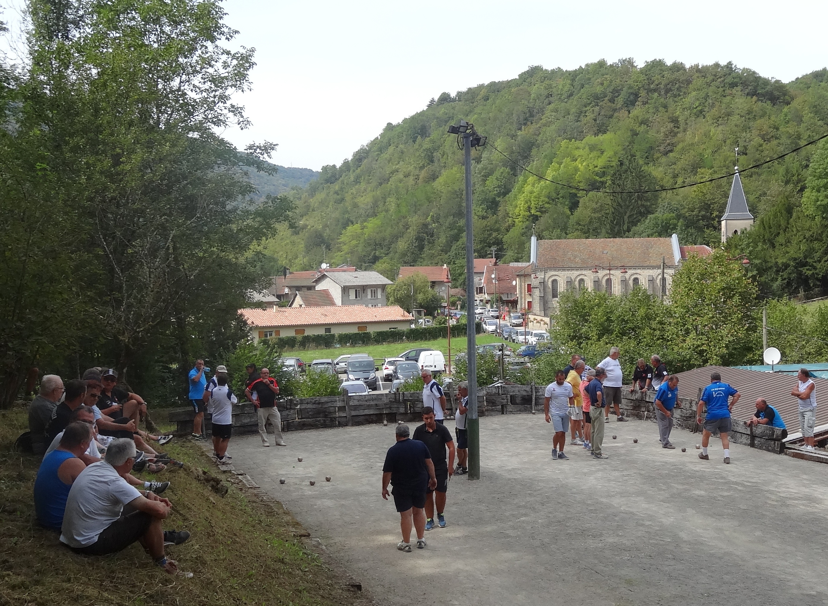 Vue de la fête du Boudin de Conand. Les jeux de boules